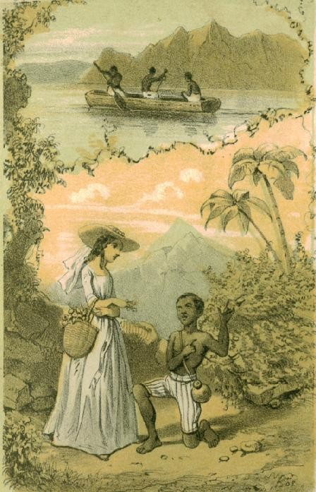 Scan van een illustratie uit Uit verre landen en van nabij (1857).